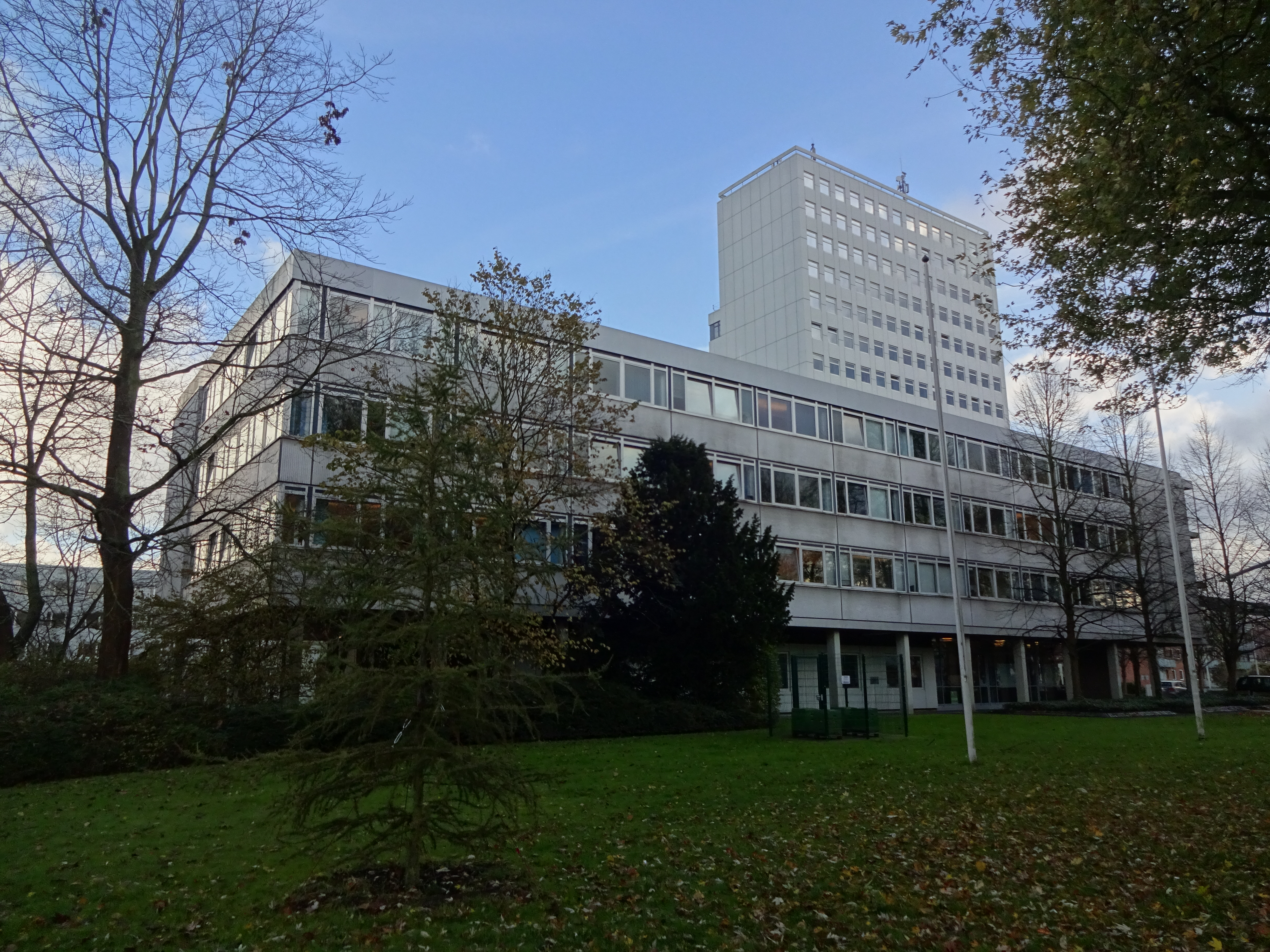 Gebäude der Zentrale des LVermGeo SH